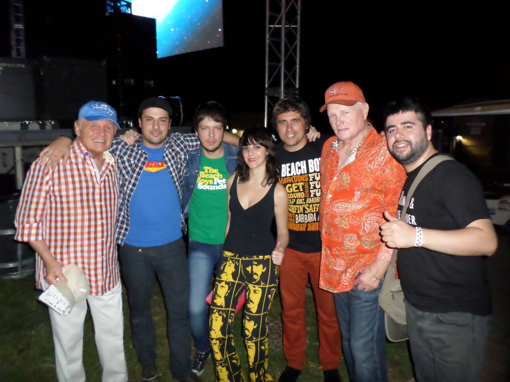 nubes